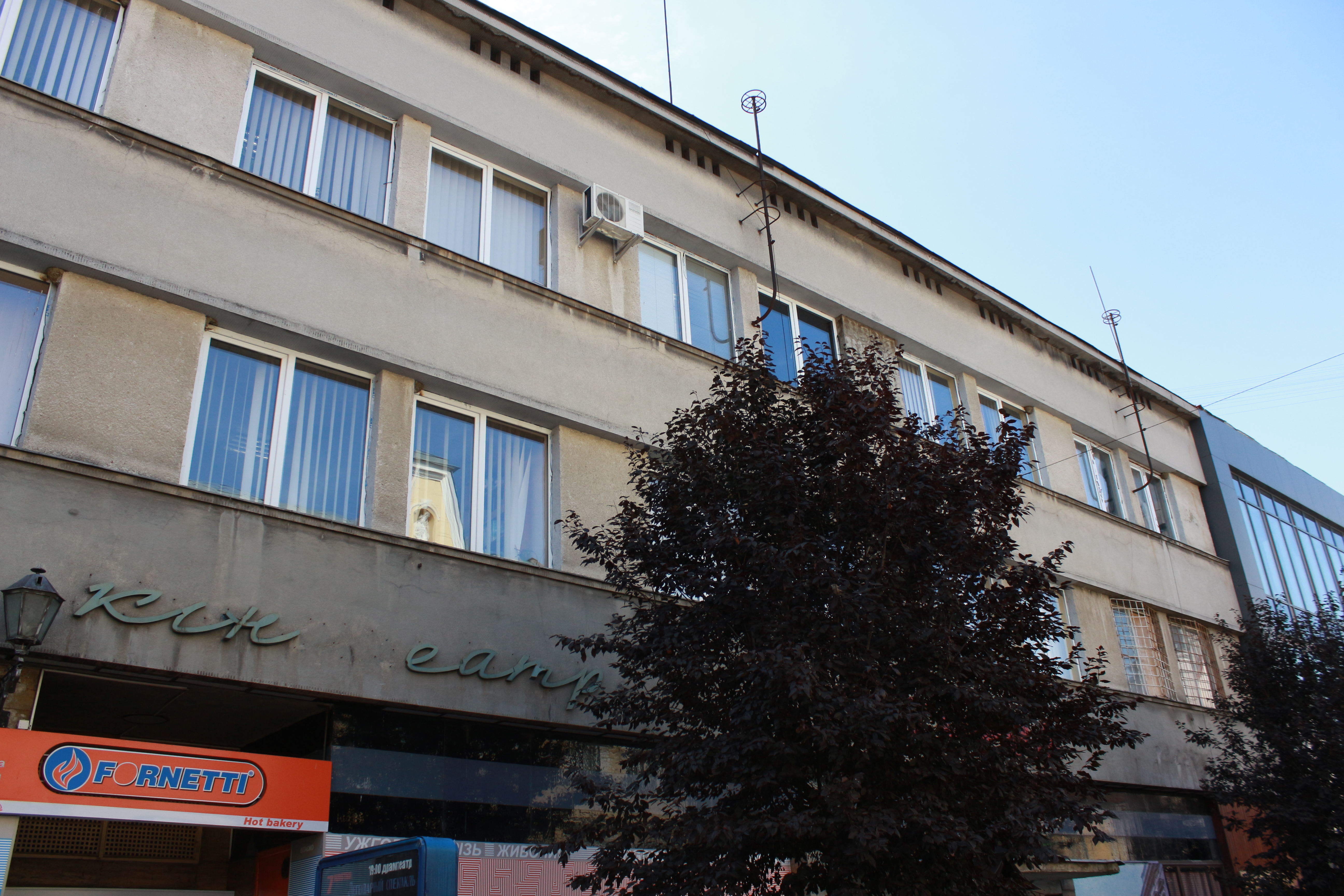 Житловий будинок, Ужгород, вул. Волошина, 22